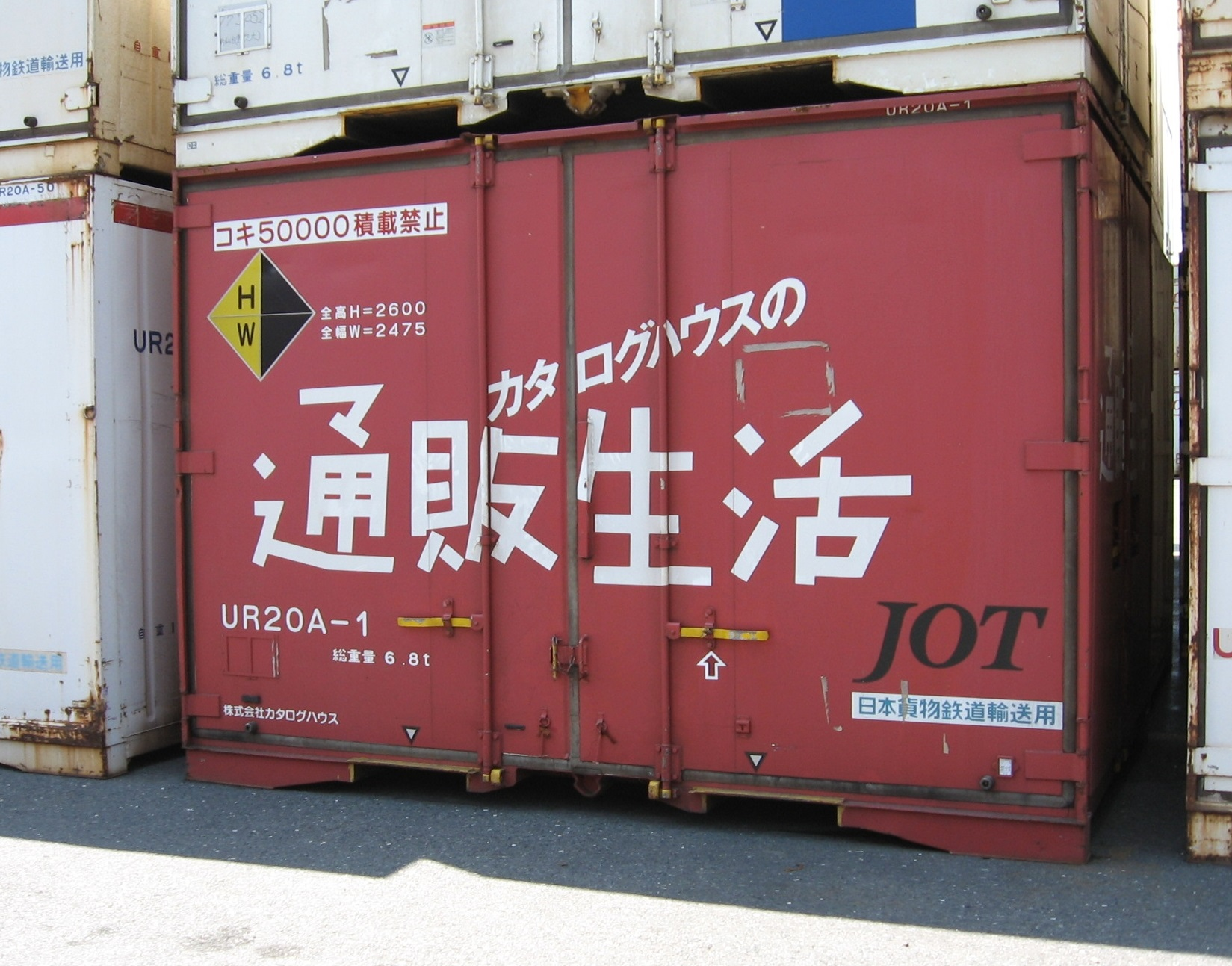 JR貨物より日本国内での鉄道輸送用に承認登録されて、民間企業が所有及び使用している 「 鉄道私有コンテナ 」 。通販生活 撮影地＝【福岡(タ)】